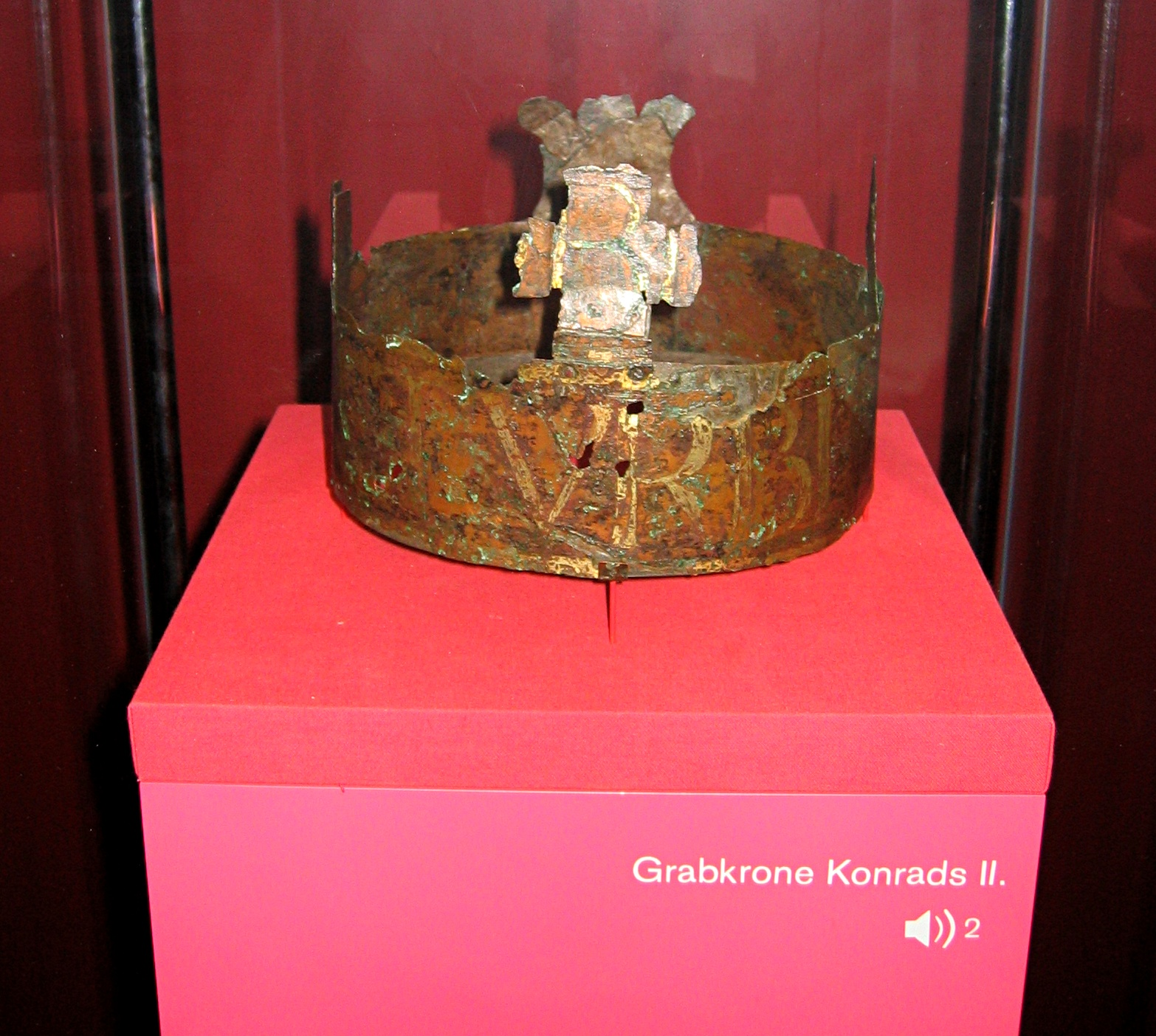 Die Grabkrone Konrads II. aus der Domschatzkammer des Dom zu Speyer (Historisches Museum der Pfalz), wo auch Konrads Grabstätte liegt.